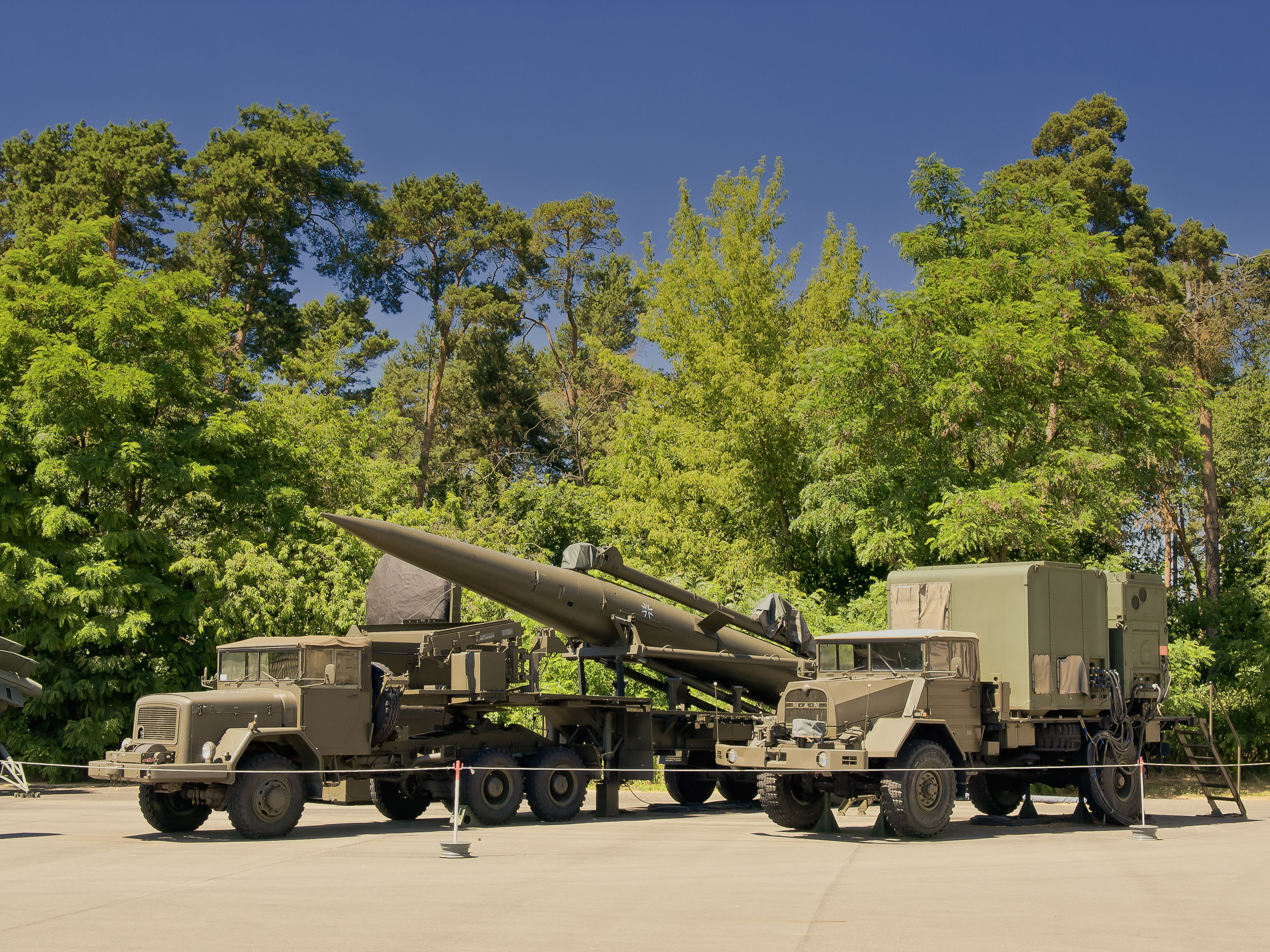 Pershing 1A im Luftwaffenmuseum Gatow.